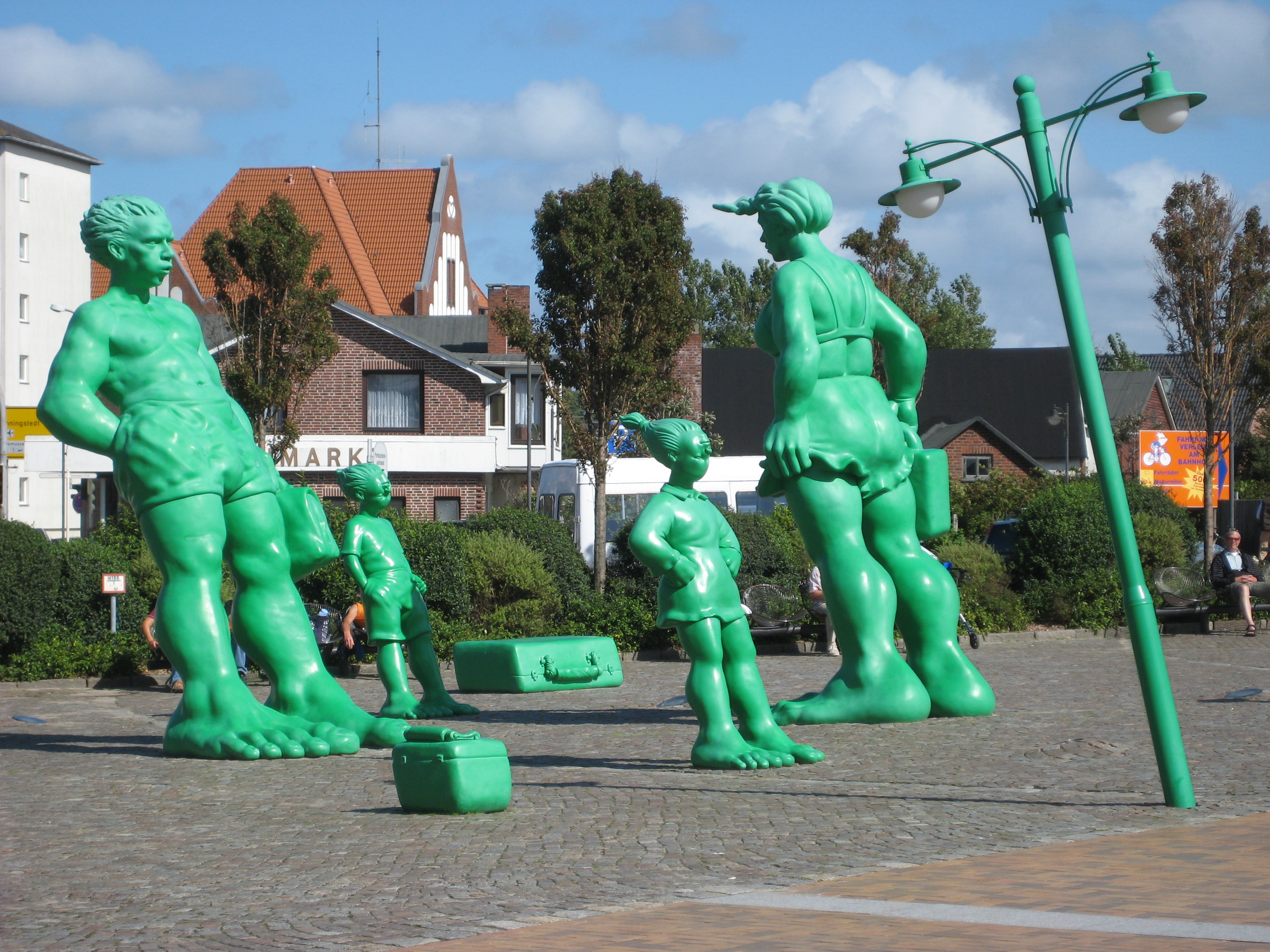 Skulpturen "Reisende im Wind" von Martin Wolke auf Sylt